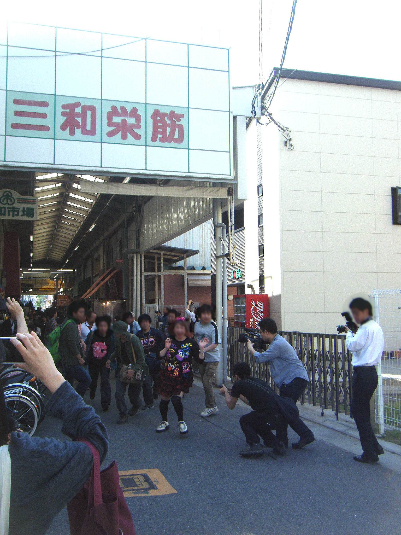 三和市場イベント「怪獣市場デラックス2」にて、田口清隆監督による短編映画制作風景。 兵庫県尼崎市